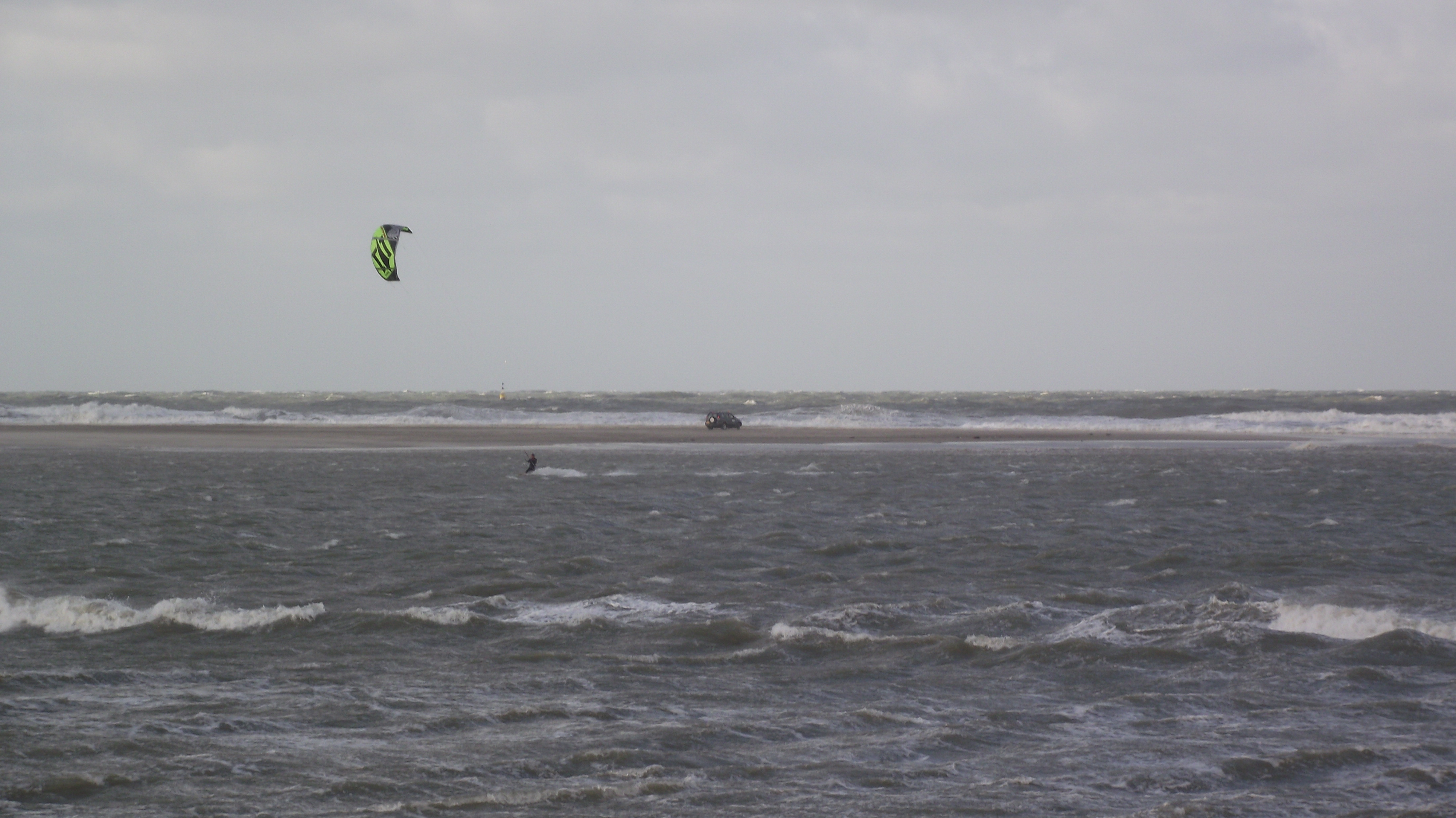 Een kitesurfer in de baai en een auto van de monitoringdienst bij de landtong.